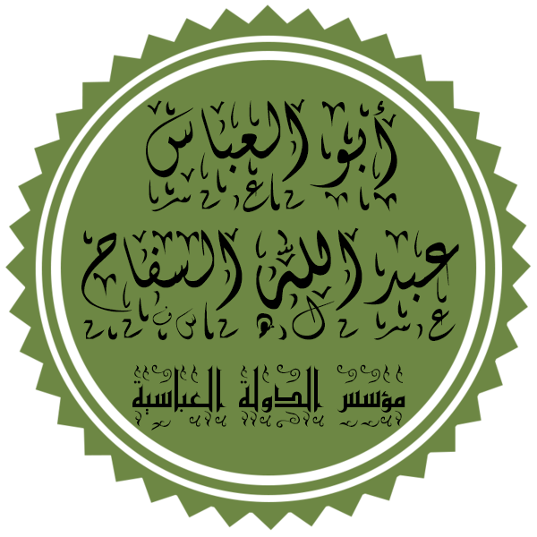 صورة بها تخطيط اسم الخليفة العباسي أبو العباس عبد الله السفاح بخط الثلث